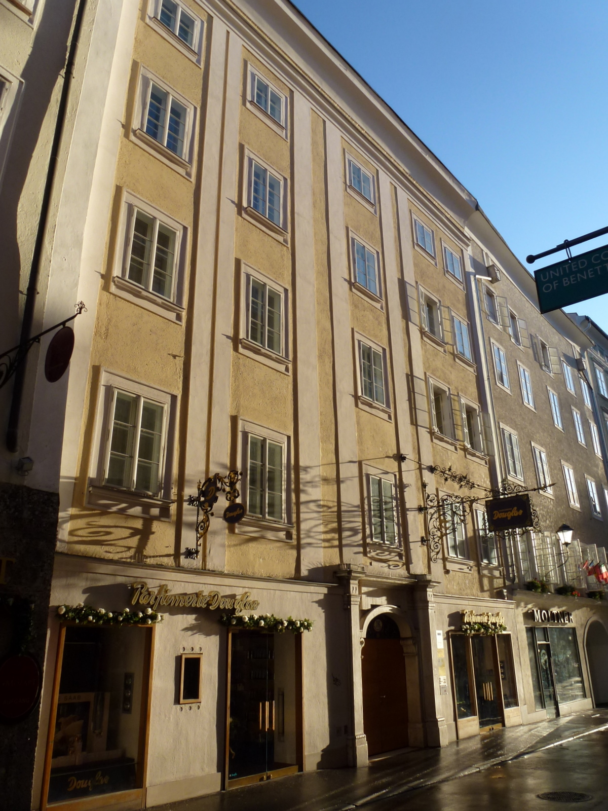 Bürgerhaus, Gschwendtnerhaus/Haus an der Alben